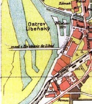 Výřez ze situačního plán staré Libně, rok 1879, doplněného na počátku 20. století.